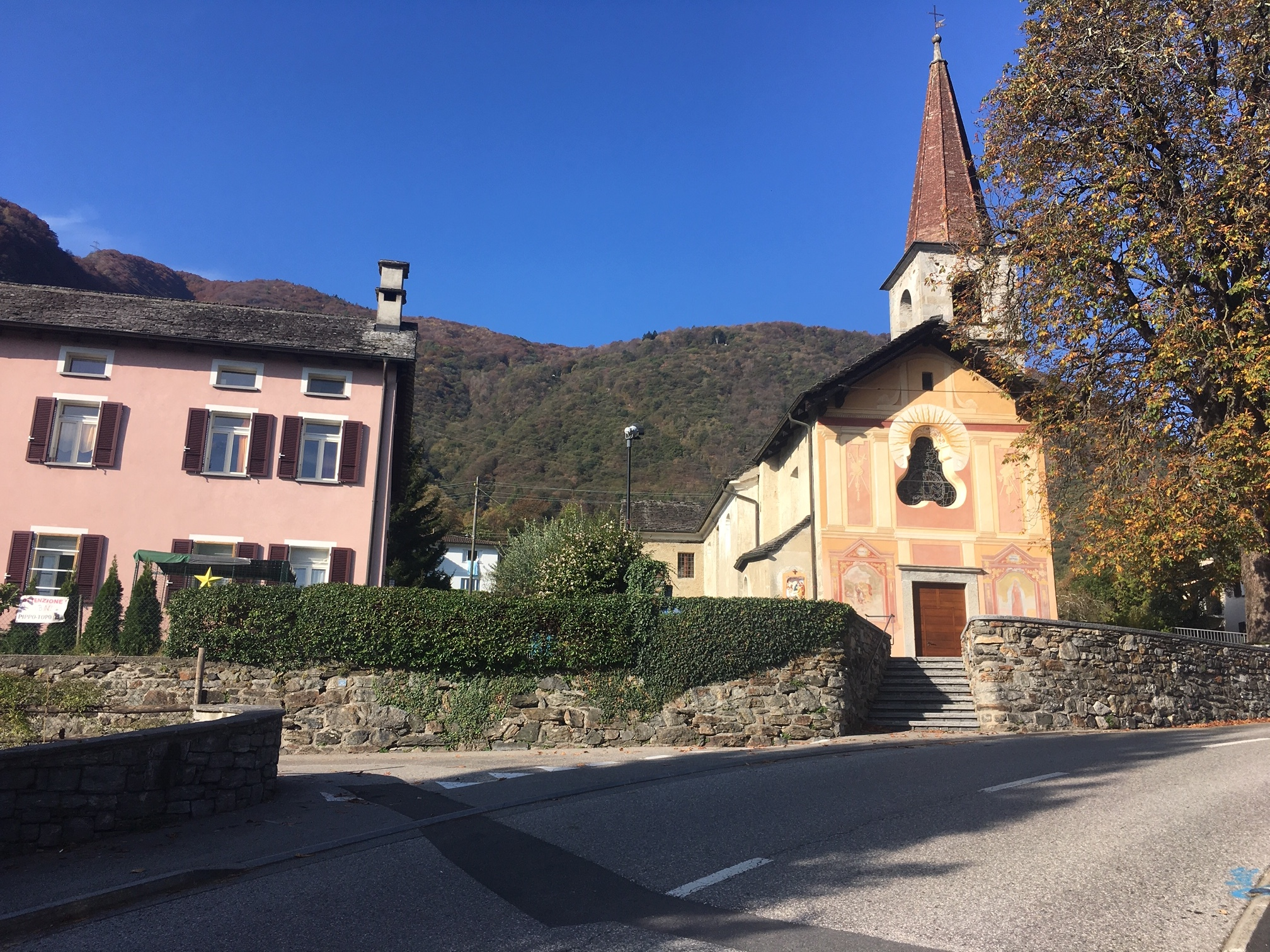 Römisch-katholische Kirche San Antonio Abate